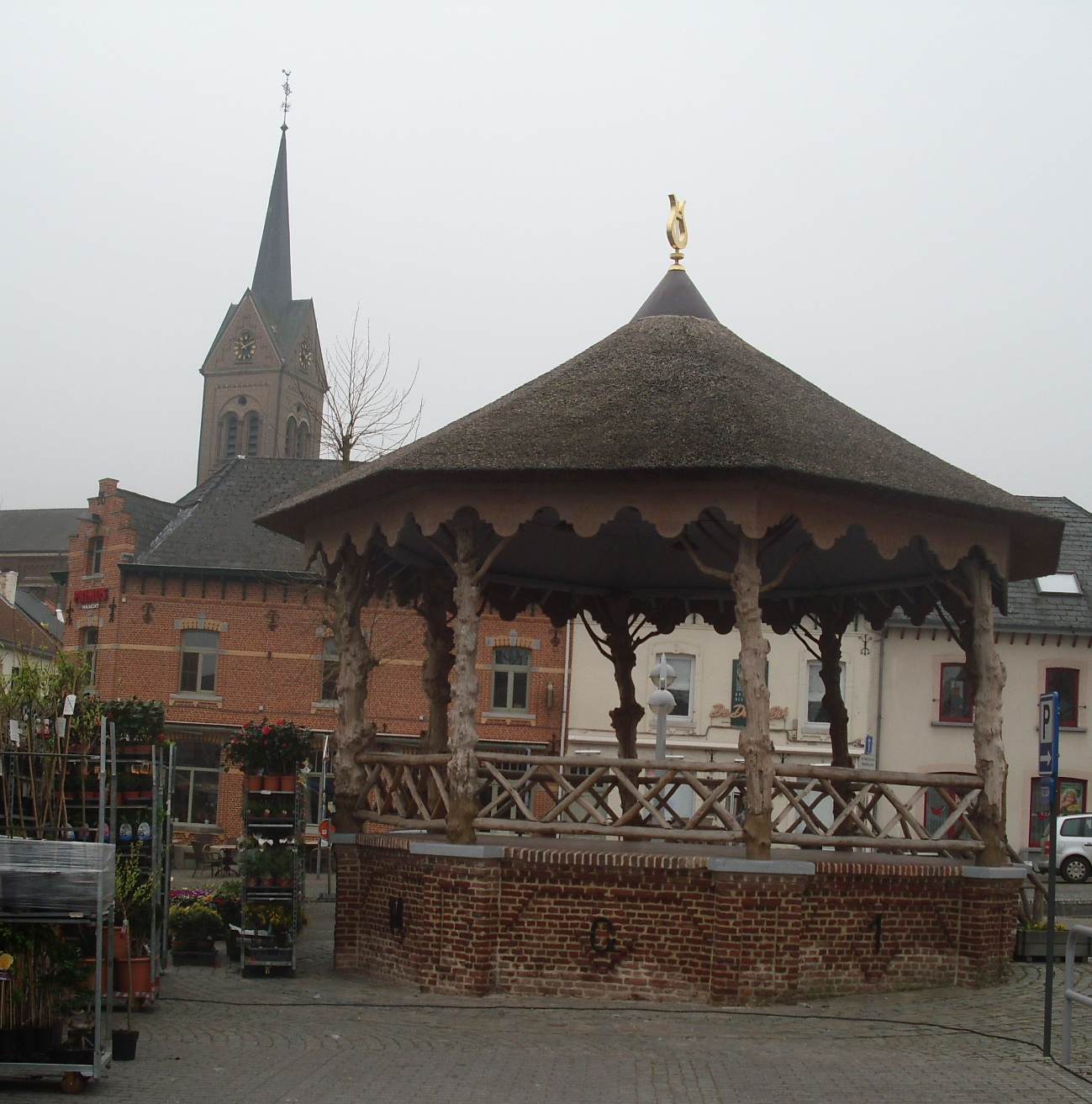 Kiosk uit 1887 - Gemeenteplein - Lummen - Belgisch Limburg